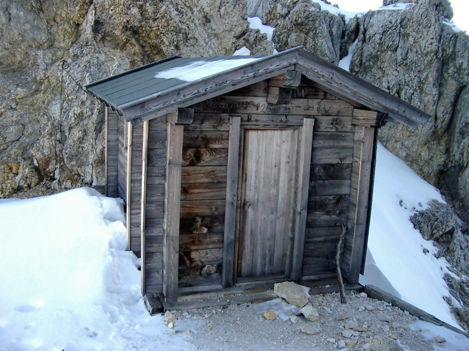 Die Birkkarhütte auf 2635m Höhe nahe der Birkkarspitze im Karwendel